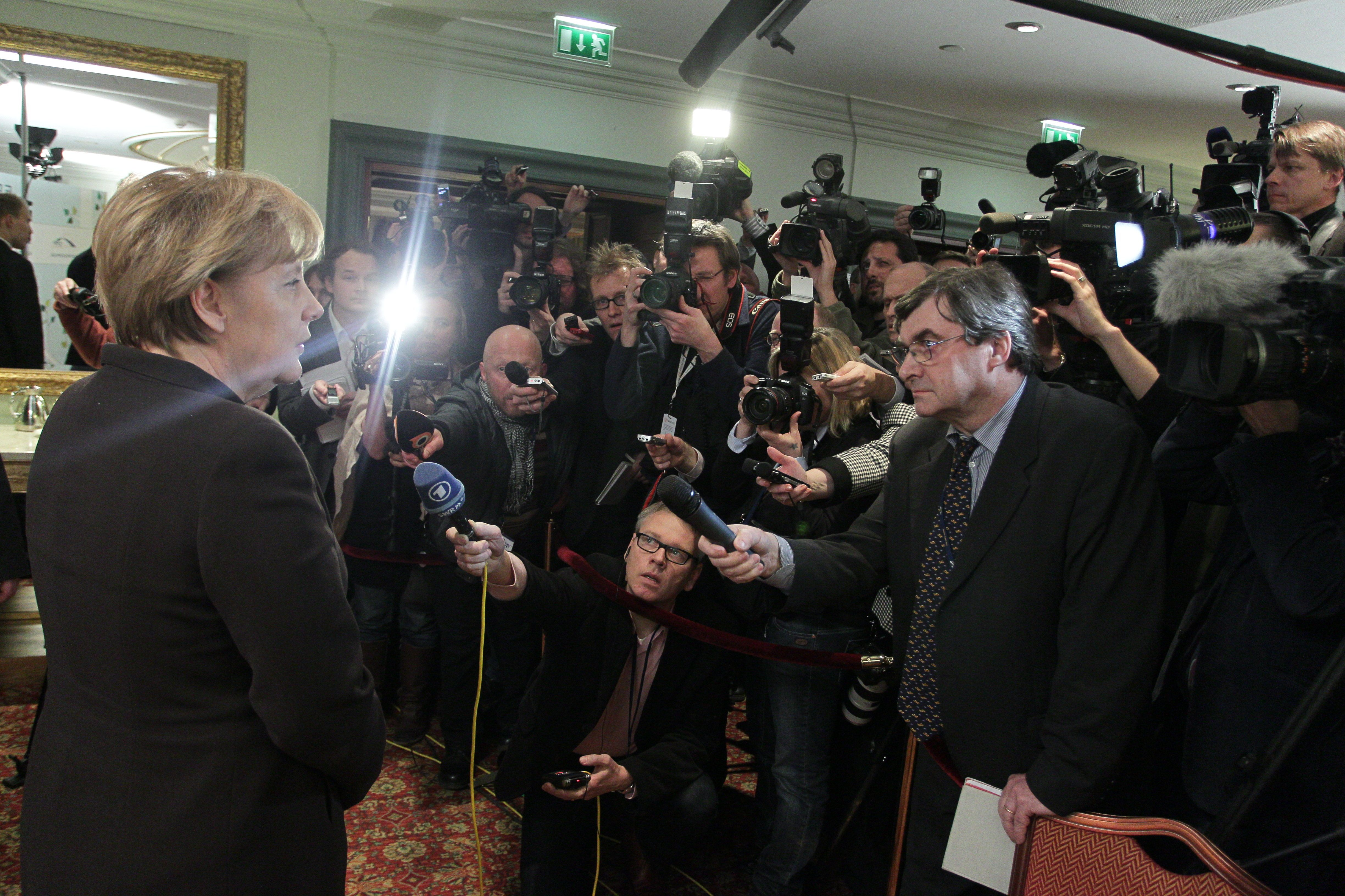 Angela Merkel EPP Summit Helsinki 4 March 2011